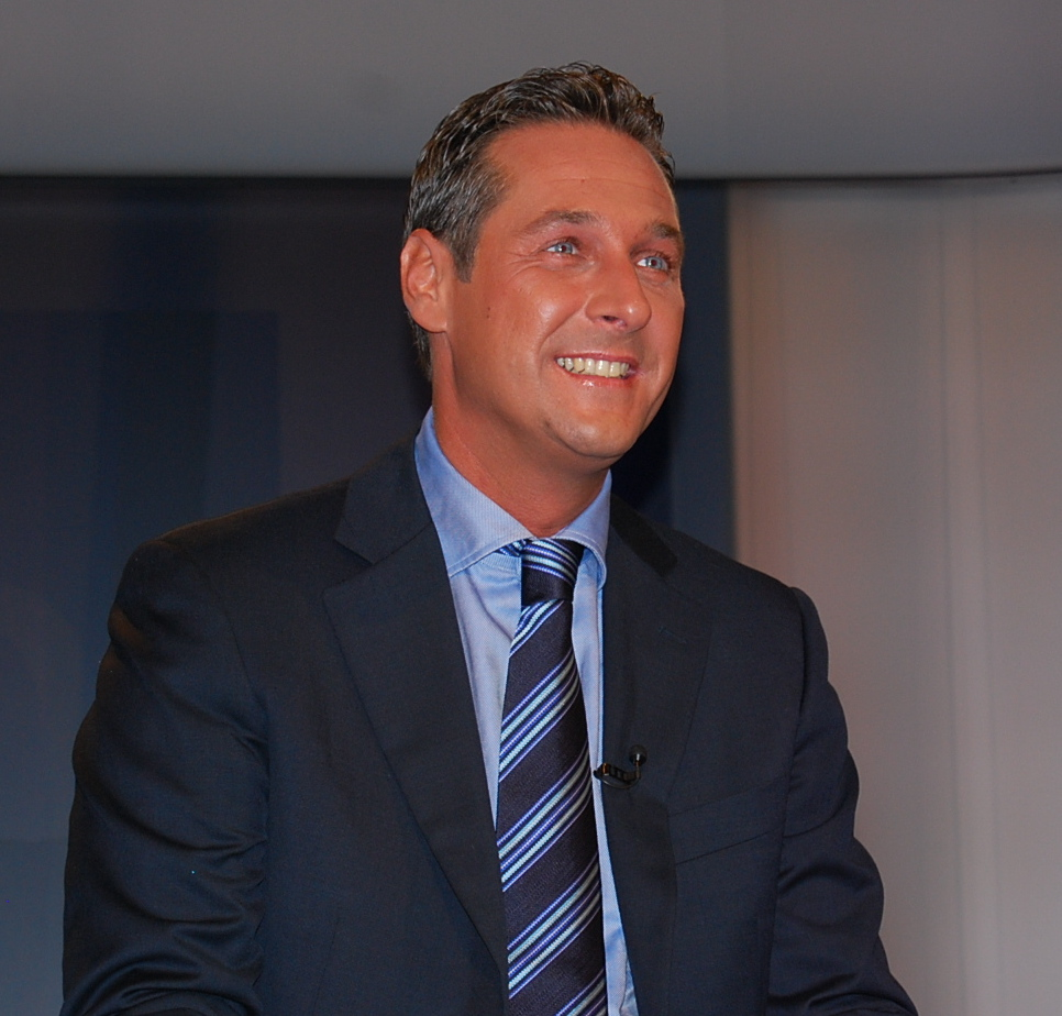 Heinz-Christian Strache bei einer TV-Konfrontation zur Nationalratswahl 2008.